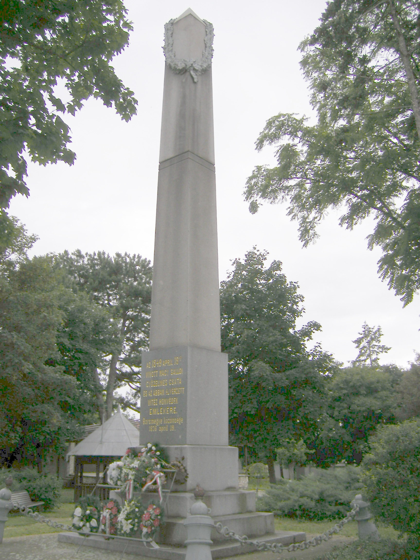 Tekovské Lužany (okres Levice) 1849 battle monument